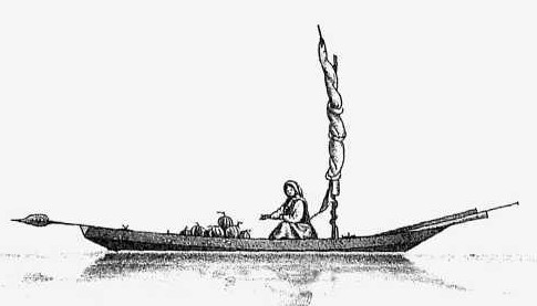 Бударка